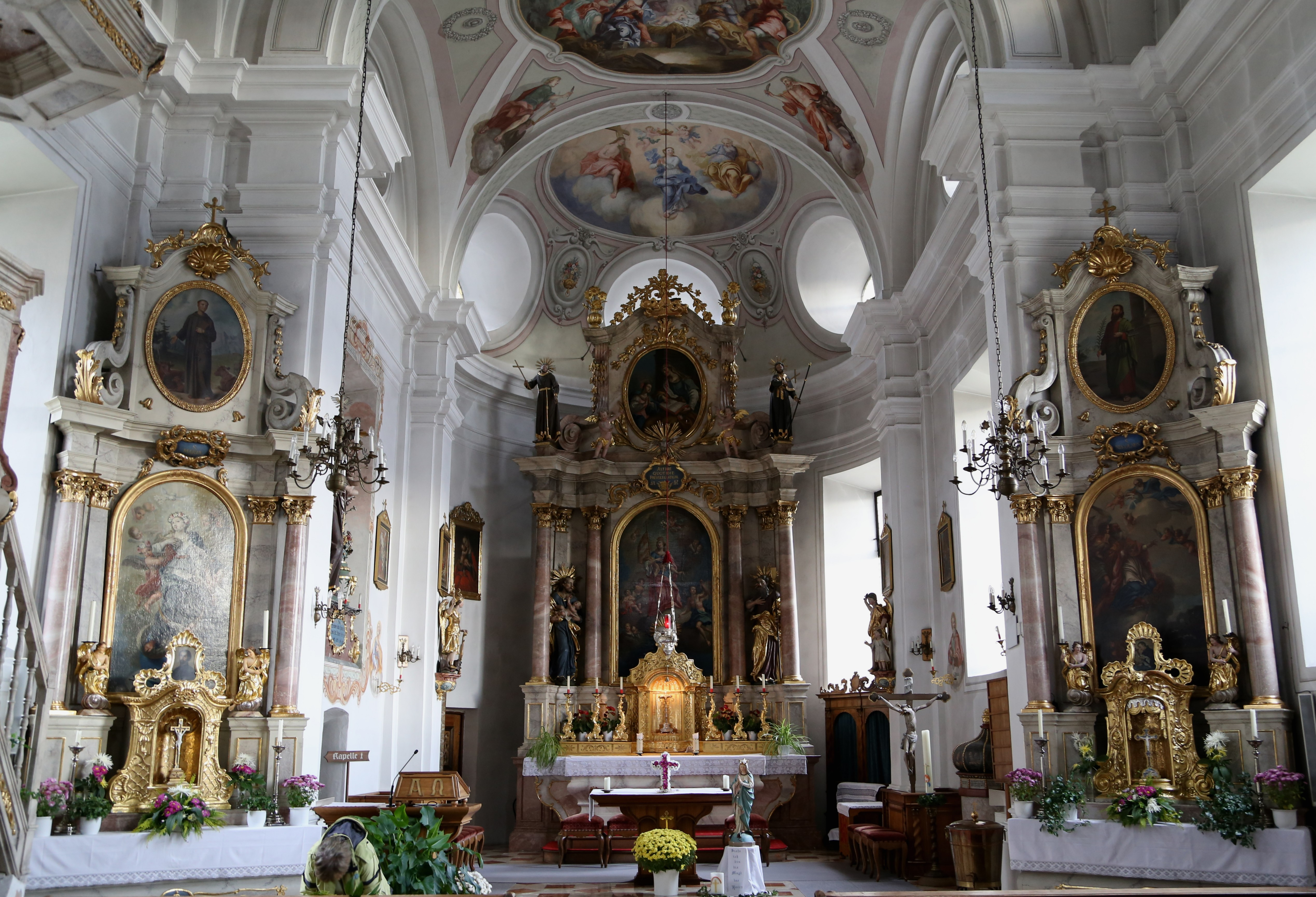 Kath. Pfarrkirche St. Ursula, Unterlangkampfen